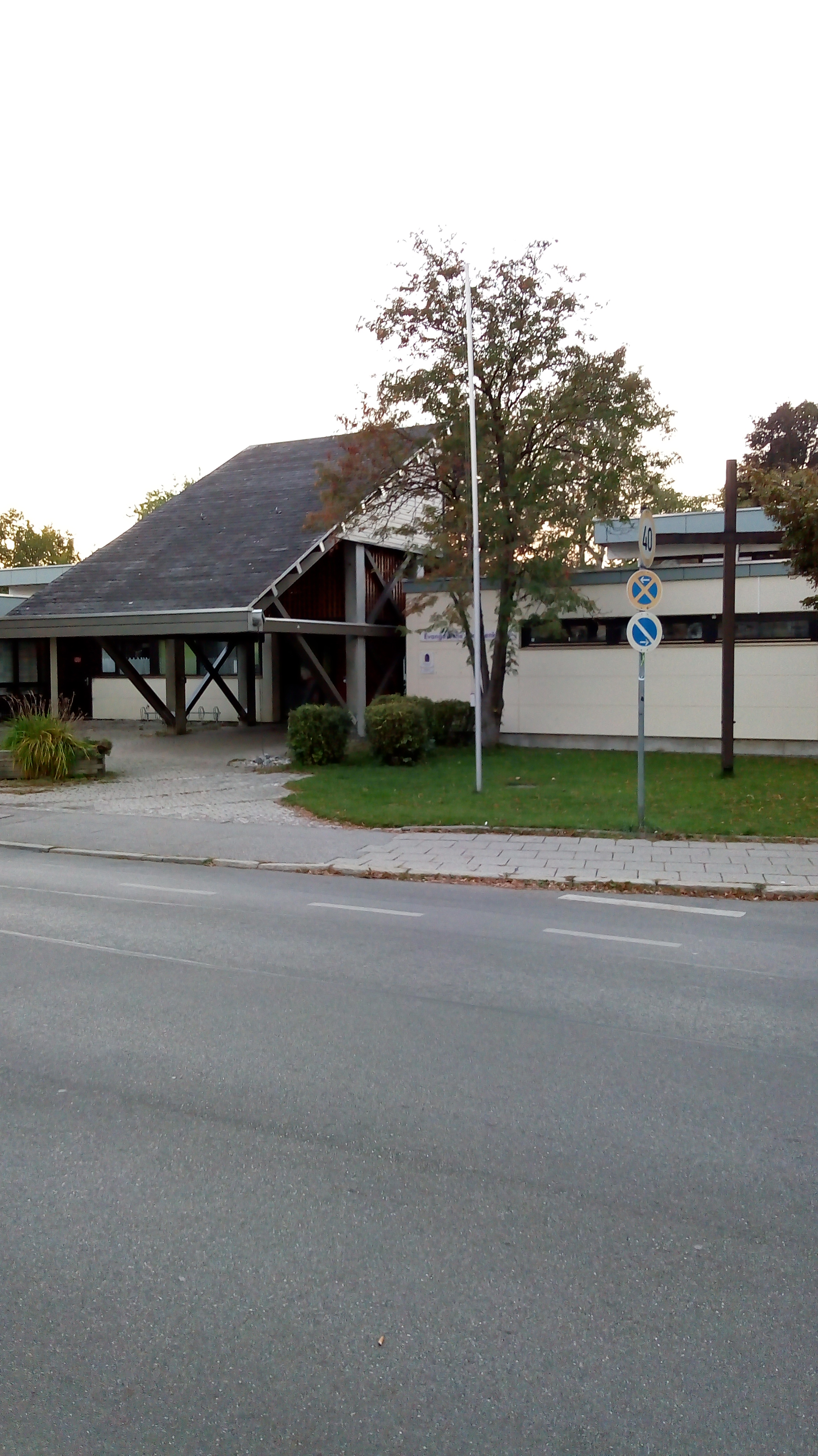 Gnadenkirche, Fürstenfeldbruck, Bayern